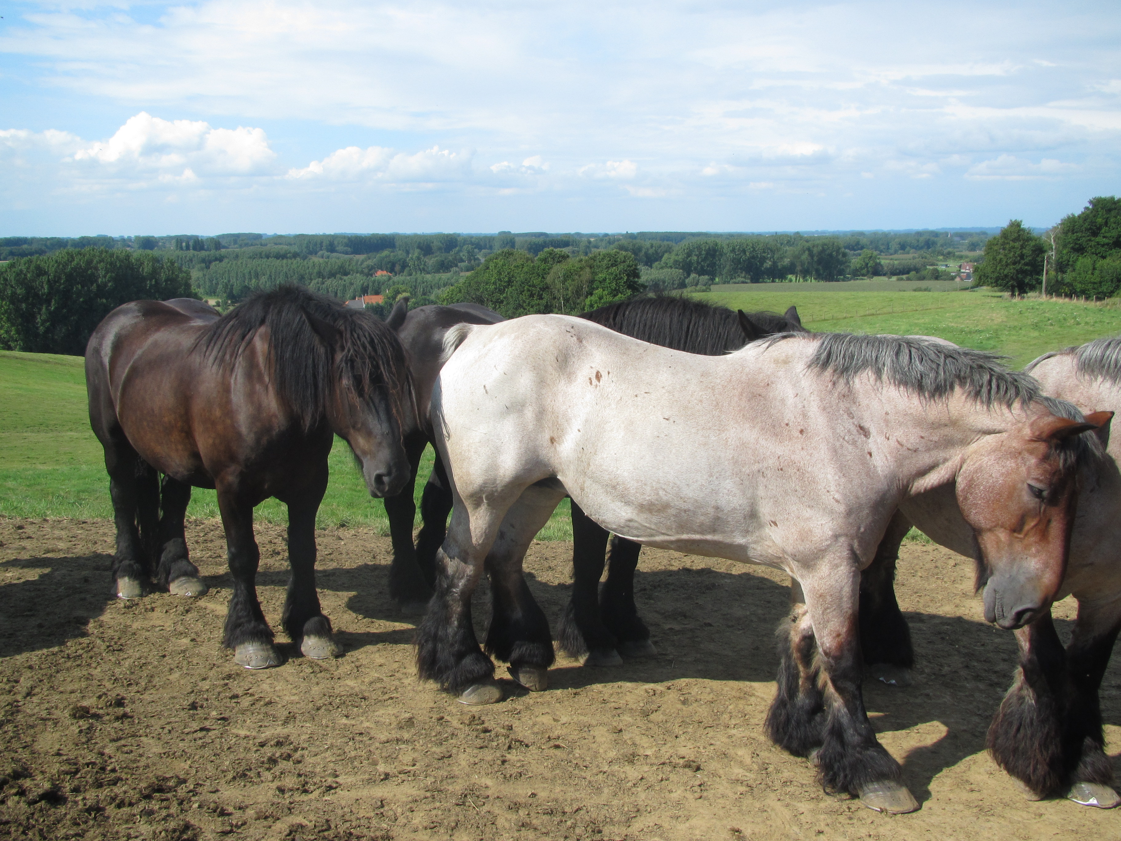 Belgische trekpaarden in weiden op de Congoberg te Vollezele. De provincie Vlaams-Brabant plaatste hier ook een infobord over het Belgisch trekpaard.